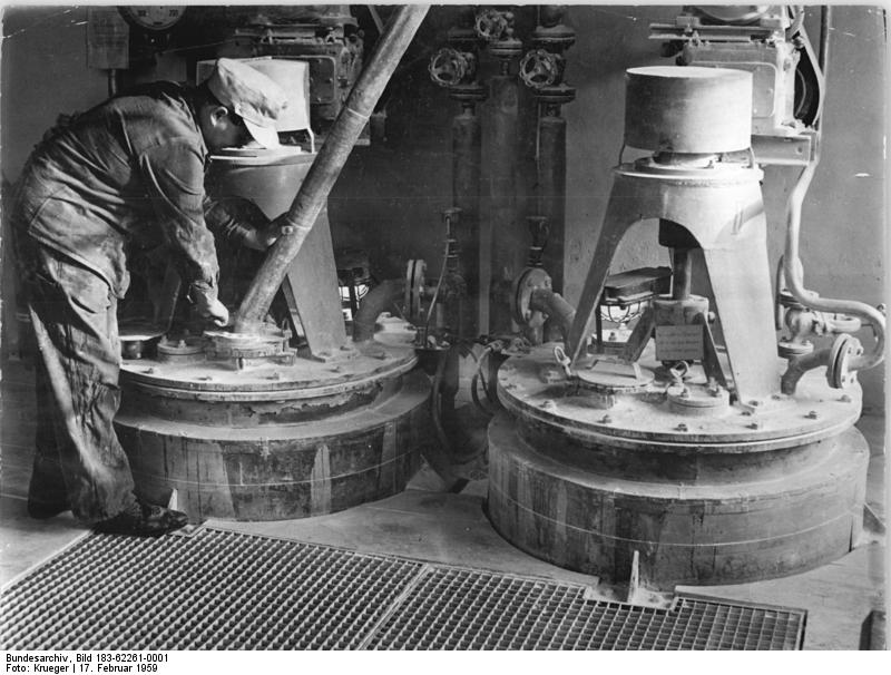 Zentralbild-Krueger Krueger-L AV 2768 18.2.59 17.2.1959 Versuchsproduktion von Prelanafasern im VEB Kunstseidenwerk "Friedrich Engels" in Premnitz aufgenommen Mit der Entwicklung der Prelanafaser (Premnitzer Wolle) und dem Aufbau der Produktionsstätten erfüllen die Chemiearbeiter die Forderung des V. Parteitages der SED nach Schließung der Lücke in der Produktion von vollsynthetischen Fasern. Mit Hilfe des von der Sowjetunion gewährten Kredites für die Chemie werden ab 1961 in der ersten Anlage jährlich 2 500 Tonnen produziert werden. Durch eine zweite Anlage soll dann die Produktion bis 1965 auf 10 000 Tonnen Prelanafaser erhöht werden. UBz: In der Lösestation der Versuchsproduktions-Anlage füllt Chemiearbeiter Hermann Koschwitz einen Lösungskessel mit dem Ausgangsmaterial Polyacrylnitril.